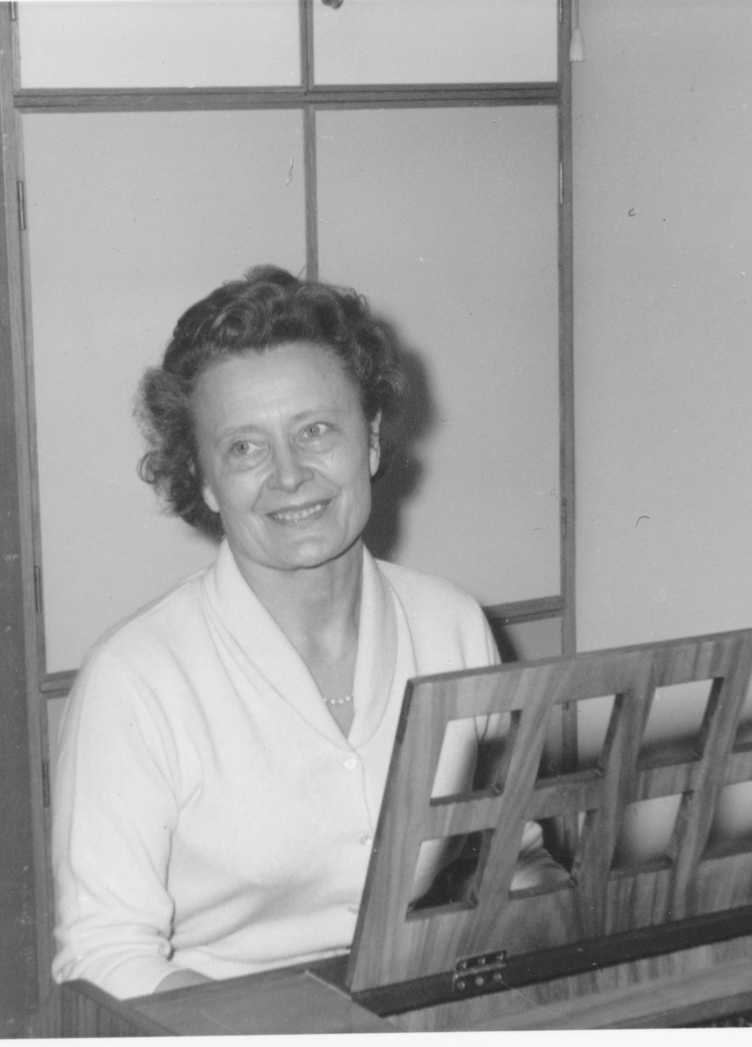 Margit Theorell vid cembalon på Kungliga Musikhögskolan 1960